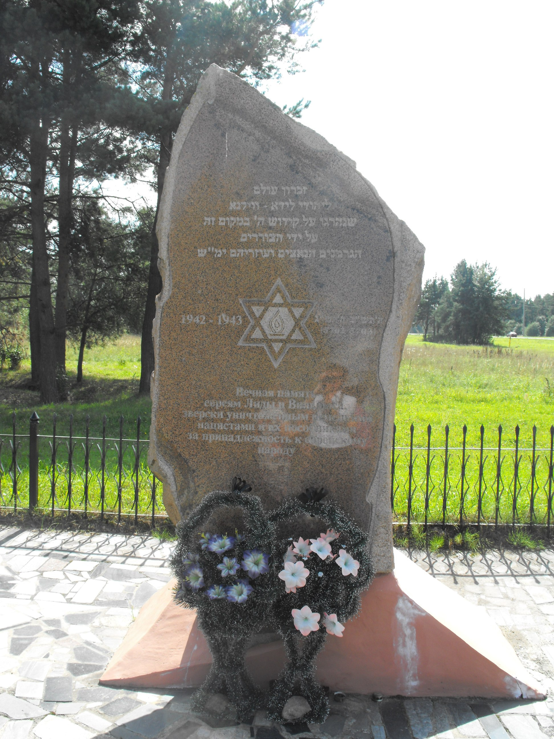 Памятник на одном из мест массовых убийств евреев Лиды и Вильнюса нацистами и их пособниками в 1942-1943 годах. Находится в Лиде на улице Красноармейской около кольцевой дороги - слева от улицы при выезде из города.